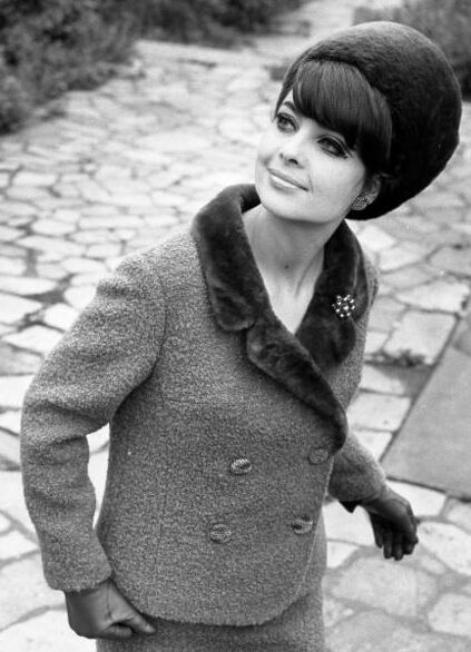 Factual corrections and alternative descriptions are encouraged separately from the original description. Additionally errors can be reported at this page to inform the Bundesarchiv. Original historic description: Leipzig, Messe, Kostüm mit Nutriakragen Zentralbild, Hochneder, 5.9.1966, Leipziger Herbstmesse 1966 - Internationale Messemodenschau im Kulturzentrum Südwest Die Firma Mönter und Stieler aus Dessau zeigte das Modell "Lorraine". Es ist ein nougatfarbenes Boucle-Kostüm in femininem Stil mit tiefgezogener Fasson. Entscheidender Akzent sind Nutriakragen und gleiche Kopfbedeckung.